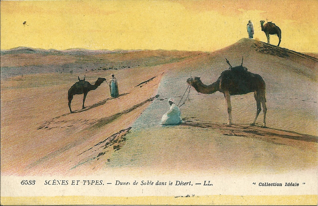 Trois chameliers & trois dromadaires dans un paysage désertique